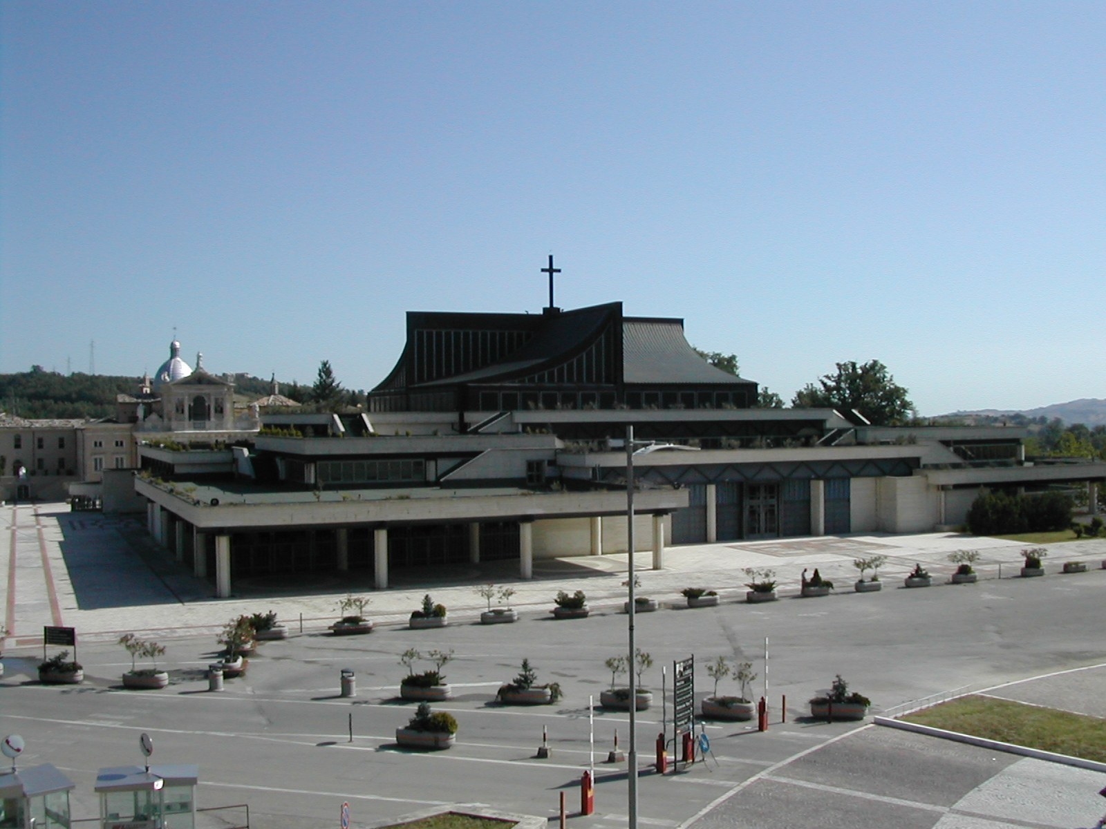 Santuario di San Gabriele dell'Addolorata ad Isola del Gran Sasso d'Italia, in Italia